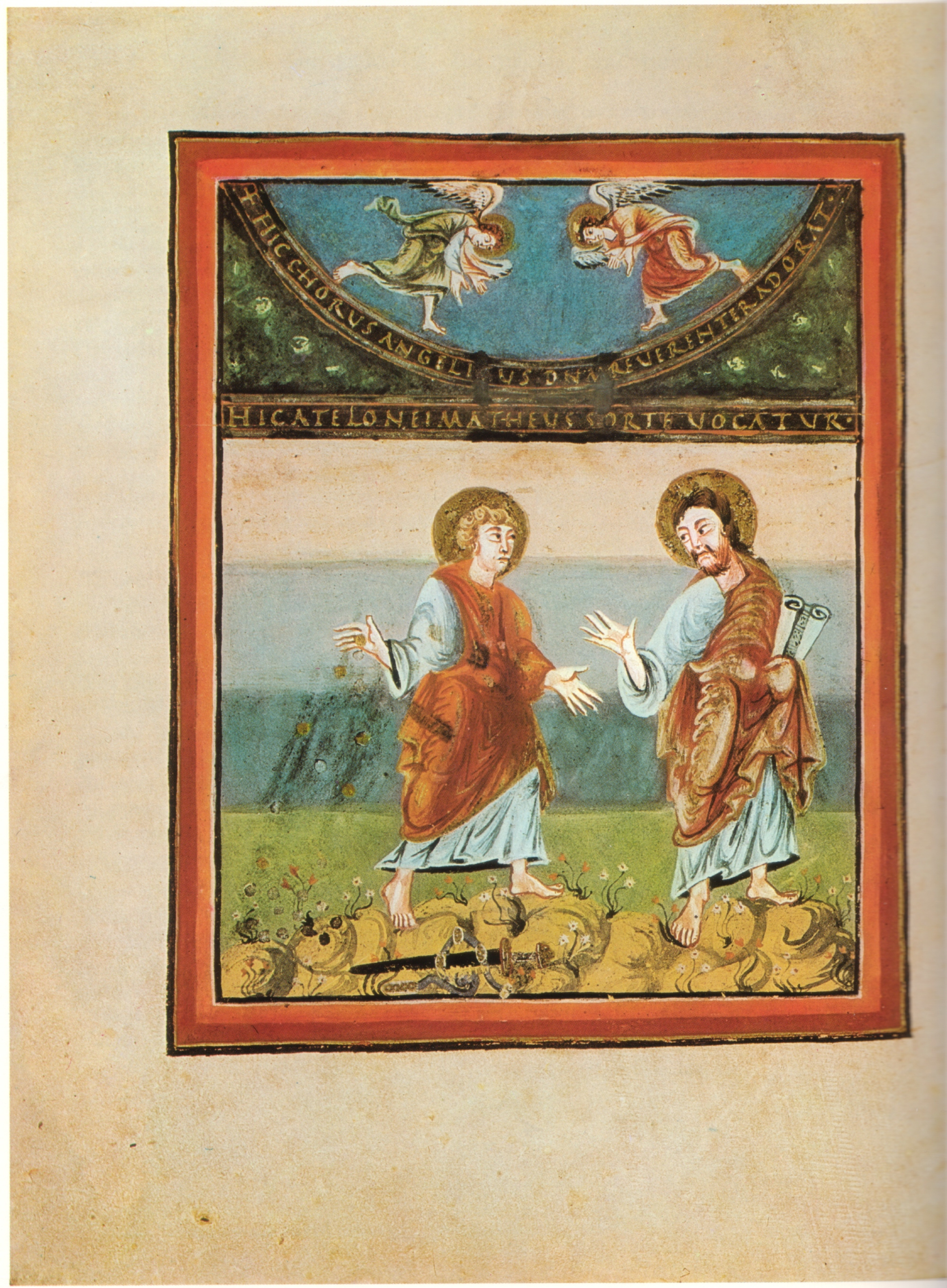 Prag, Kapitulni Knihovna, Cim. 2 (23v) Saint-Vaast, spätes 9. Jahrhundert Berufung des Matthäus